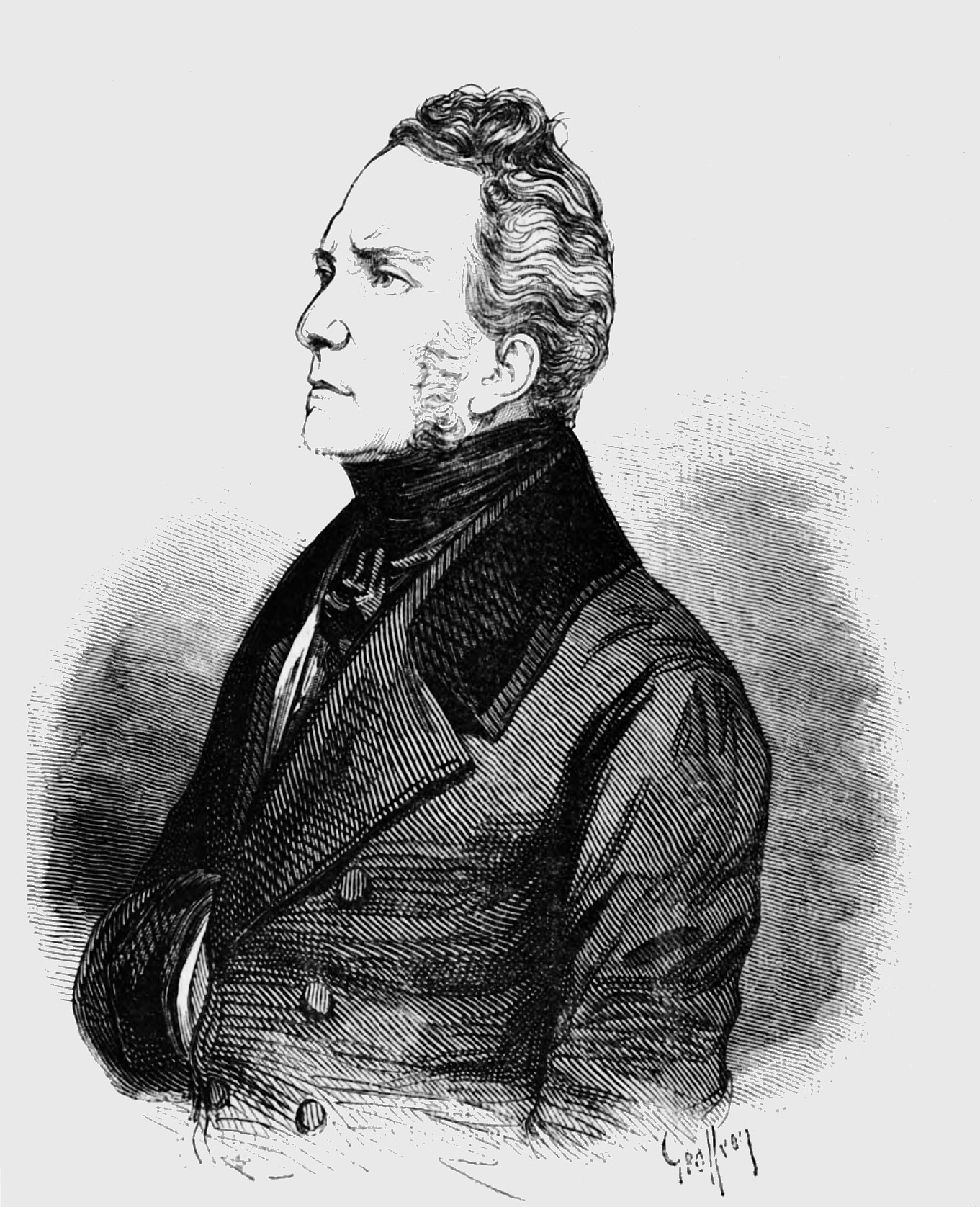 "M. Barbet de Jouy, consul de France à Maurice."